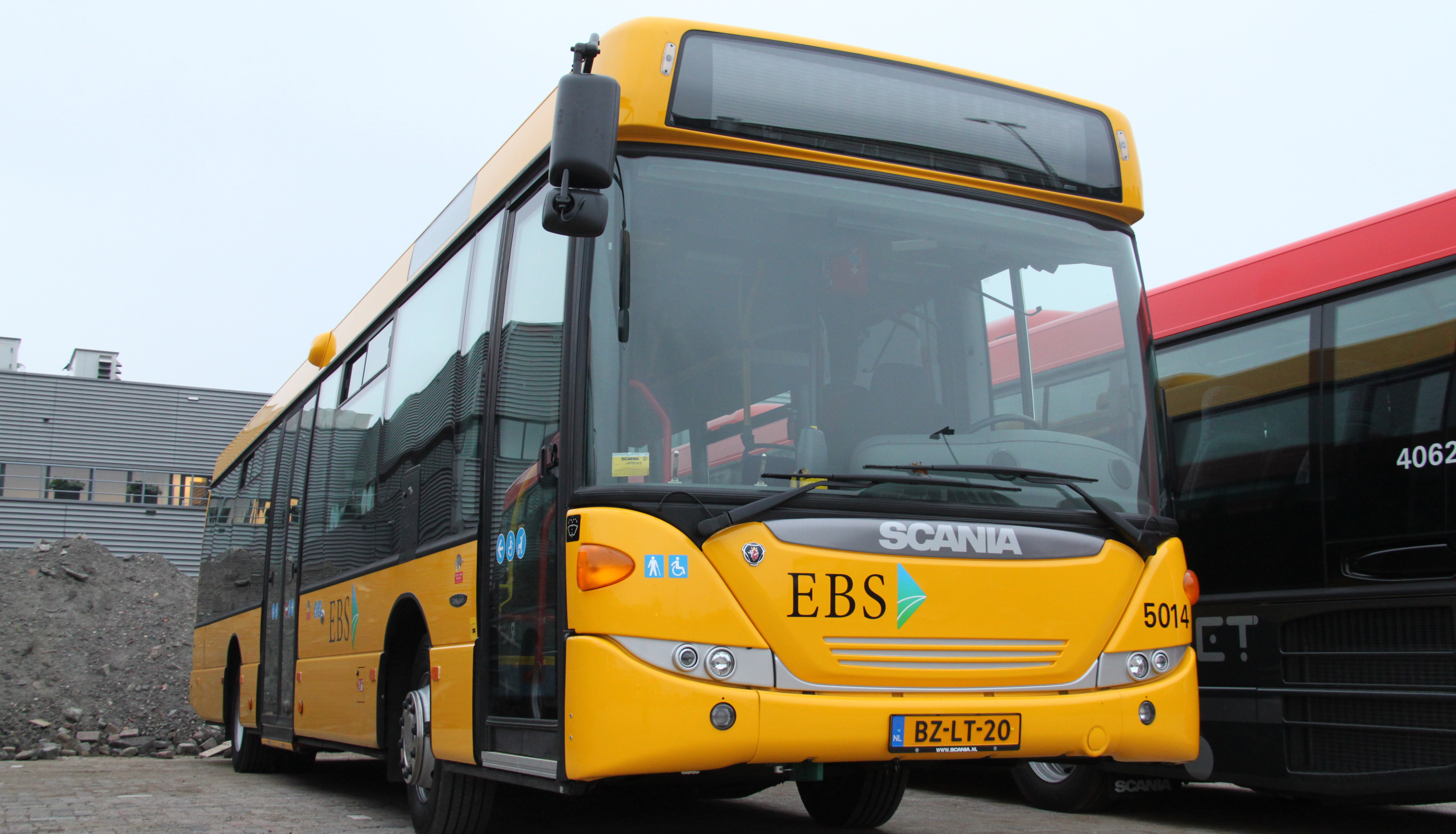 Een Scania Omnilink van Egged Bus Systems; het vervoerbedrijf dat per december 2011 het openbaar vervoer verzorgt in het concessiegebied Waterland in de Provincie Noord-Holland in opdracht van de Stadsregio Amsterdam. De getoonde bus is een Scania Omnilink.